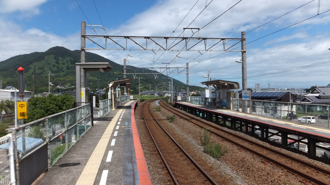 香川県坂出市府中町 讃岐府中駅 下り線ホームの国分駅方より